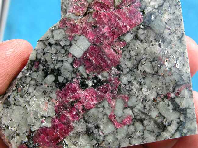 apatyt, egiryn, eudialit, pochodzenie Rosja; autor zdjęcia Piotr Menducki